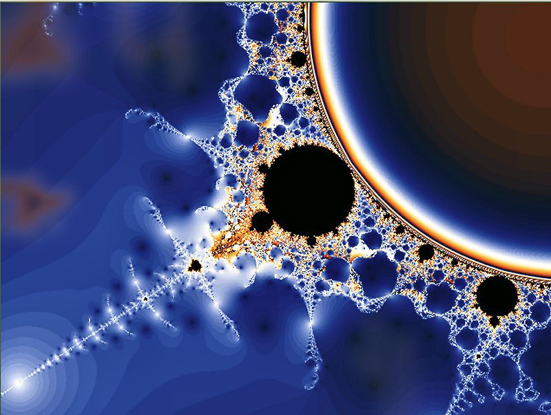 A jewell for...